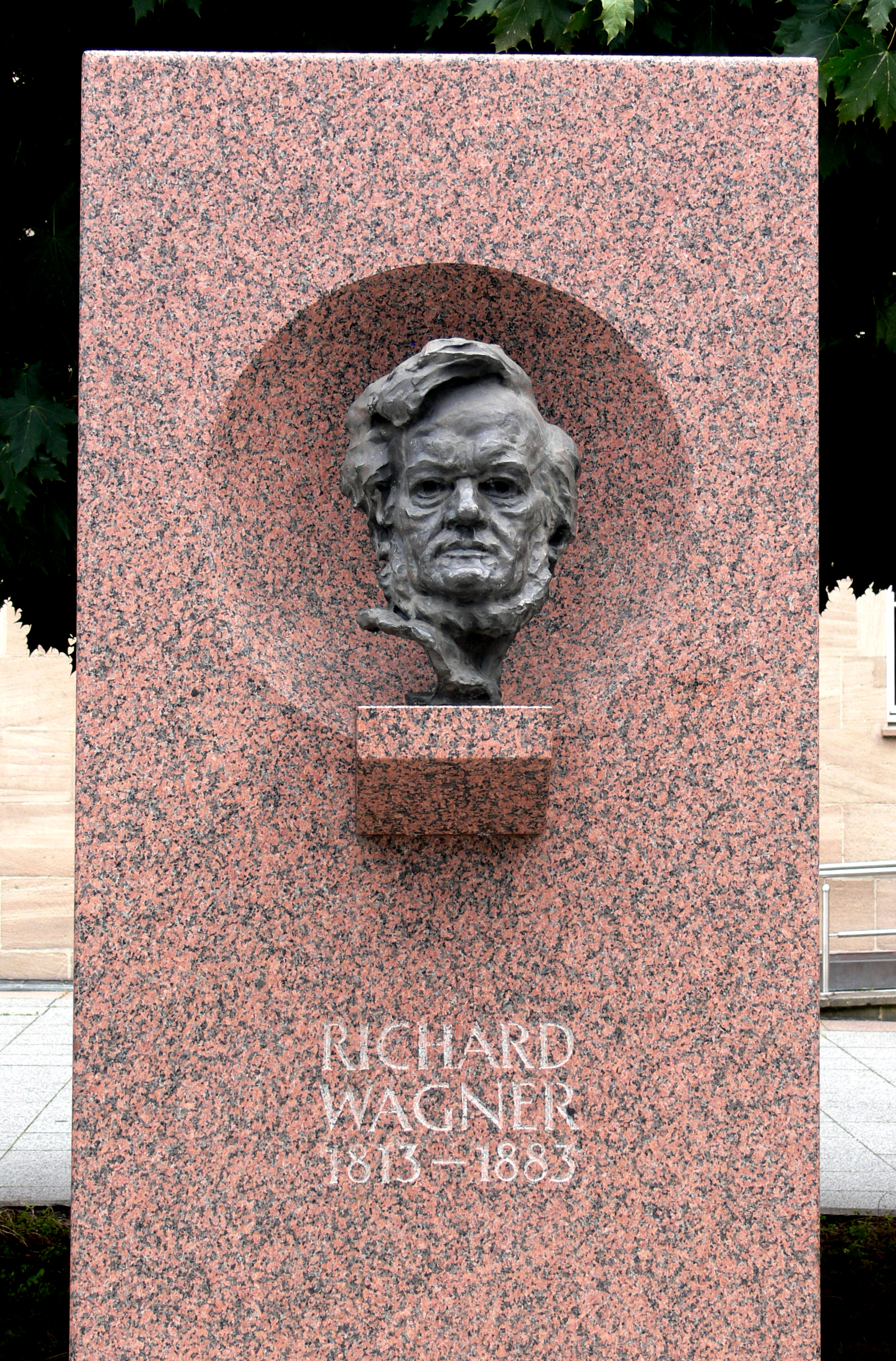 Staatstheater Nürnberg Büste "Richard Wagner" auf dem Richard-Wagner-Platz vor dem Opernhaus